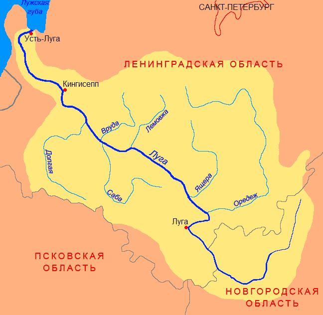 Схема бассейна реки Луга